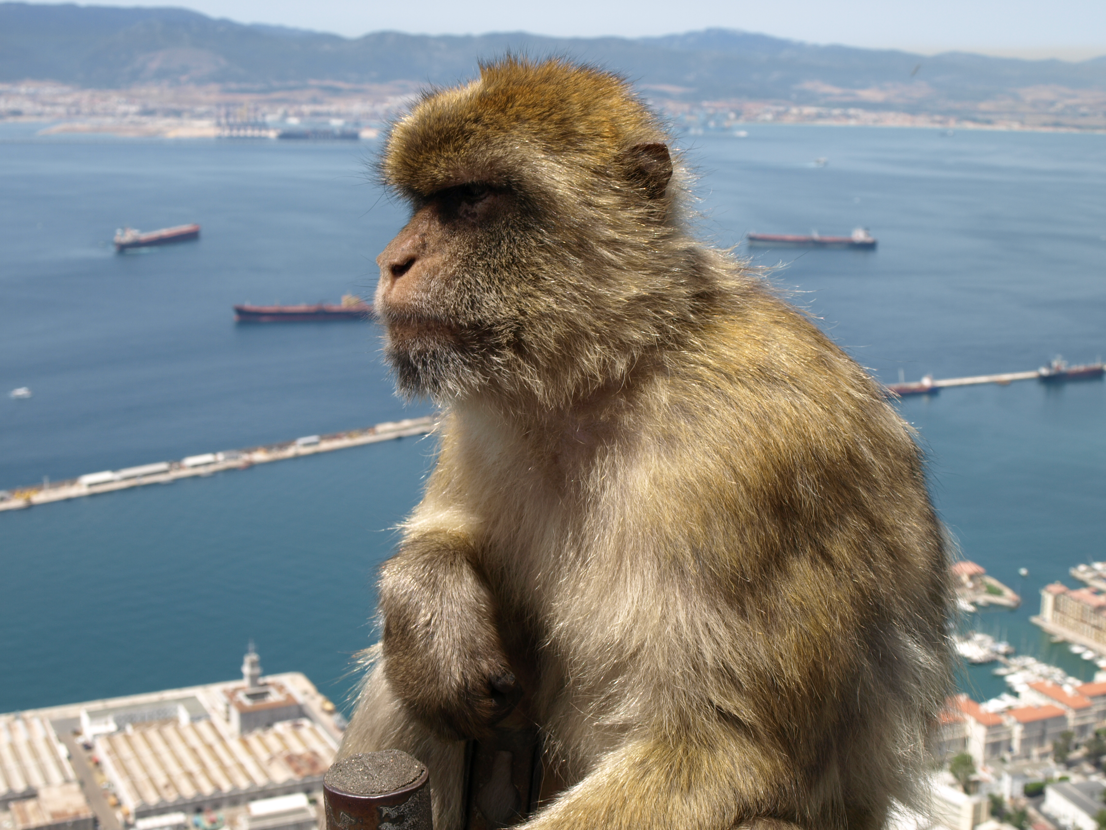 Macaco a Gibilterra